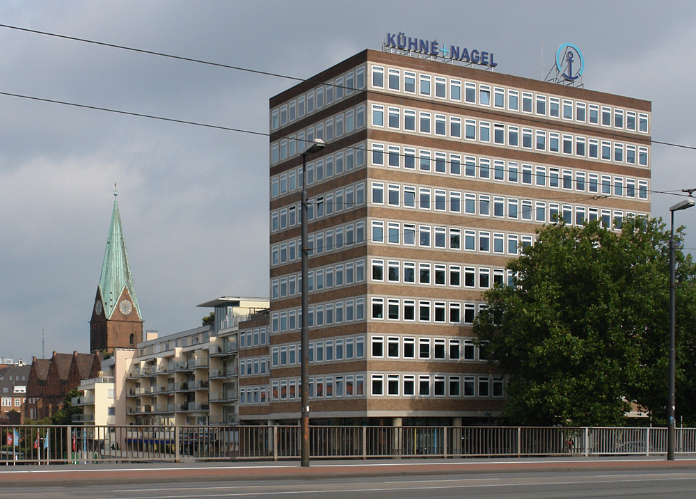 Bremen: Blick von der Wilhelm-Kaisen-Brücke auf Bürohaus Kühne + Nagel. Links die Martinikirche